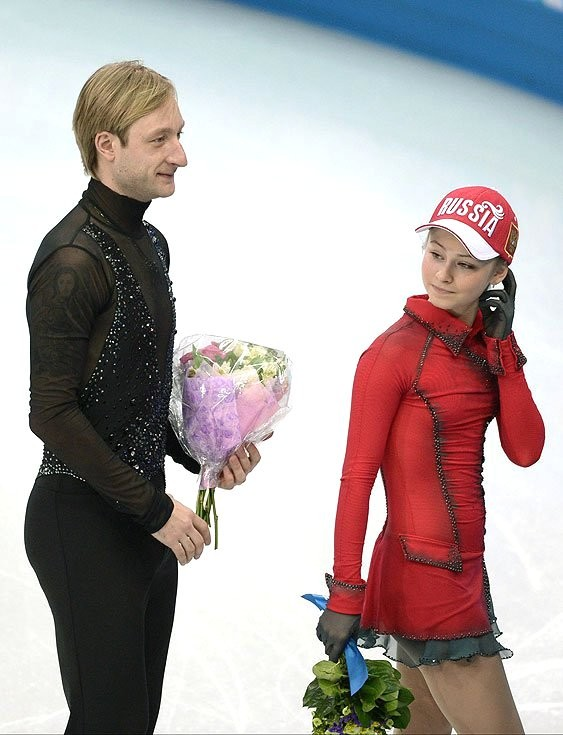 Евгений Плющенко и Юлия Липницкая завоевали золотые медали в командных соревнованиях по фигурному катанию.